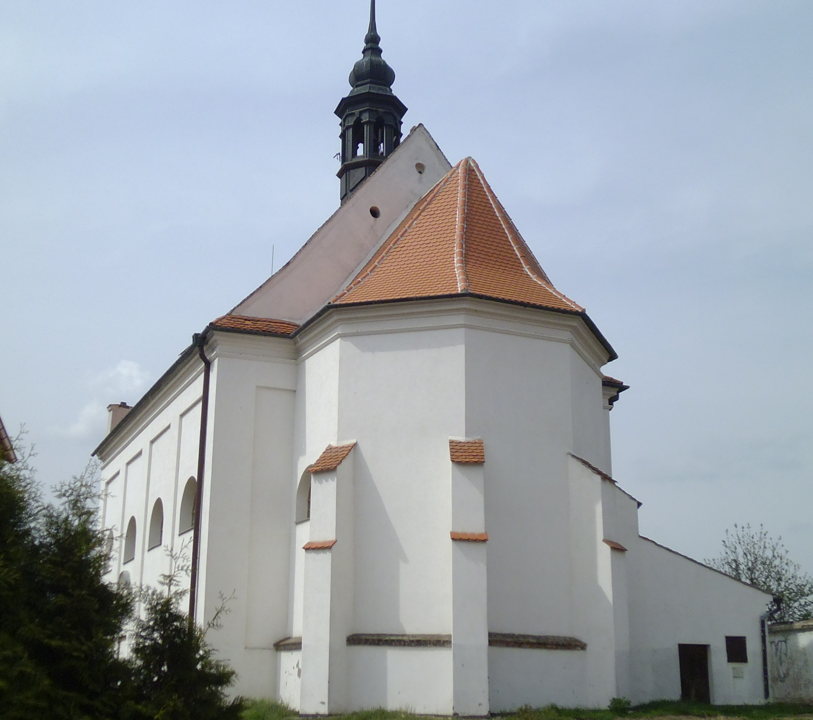 Dolní Kounice